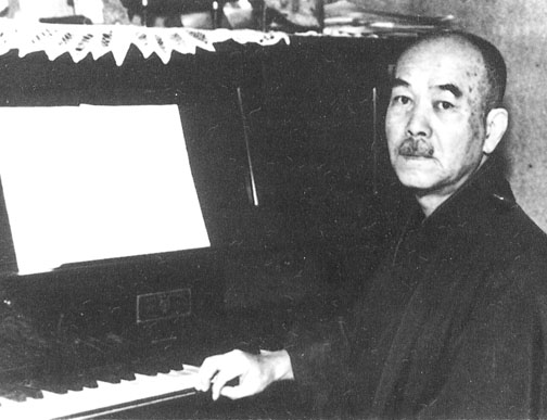 瀬戸口藤吉(Setoguchi Toukichi,1868-1941)